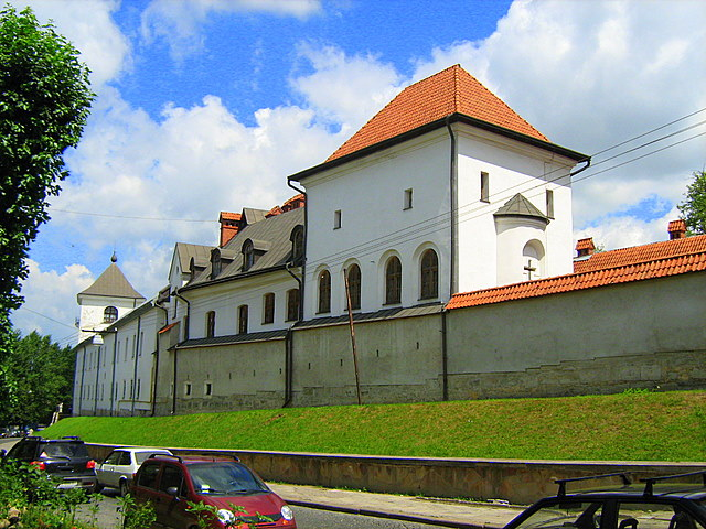 Онуфриевский монастырь во Львове